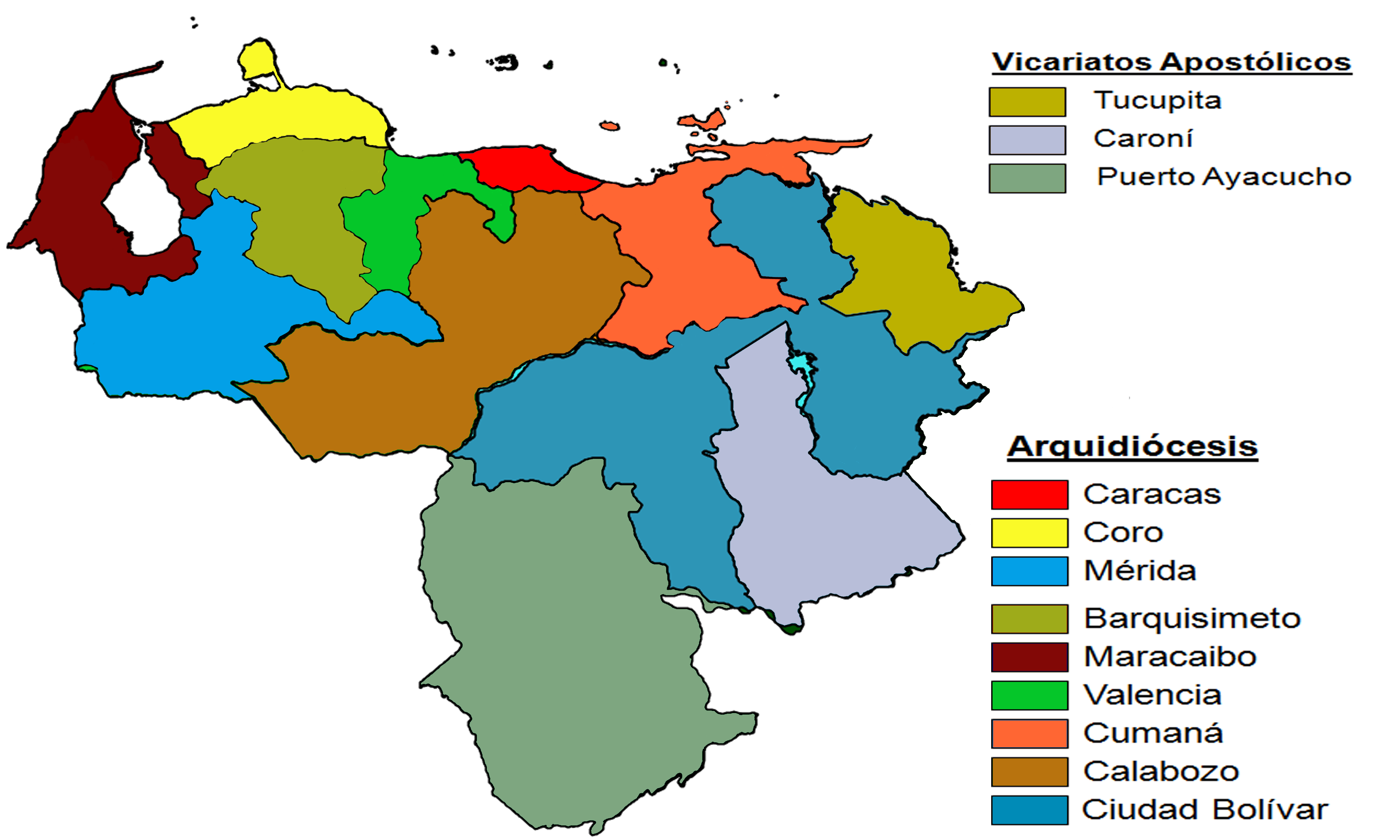 Arquidiócesis de Venezuela